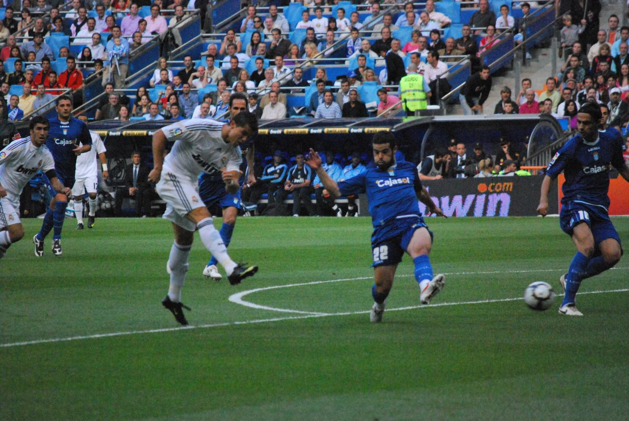 Real Madrid 5 - Xerez 0 20/9/09